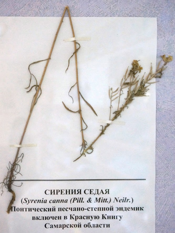 Сирения седая (Syrenia саnа) в музее института экологии Волжского бассейна РАН